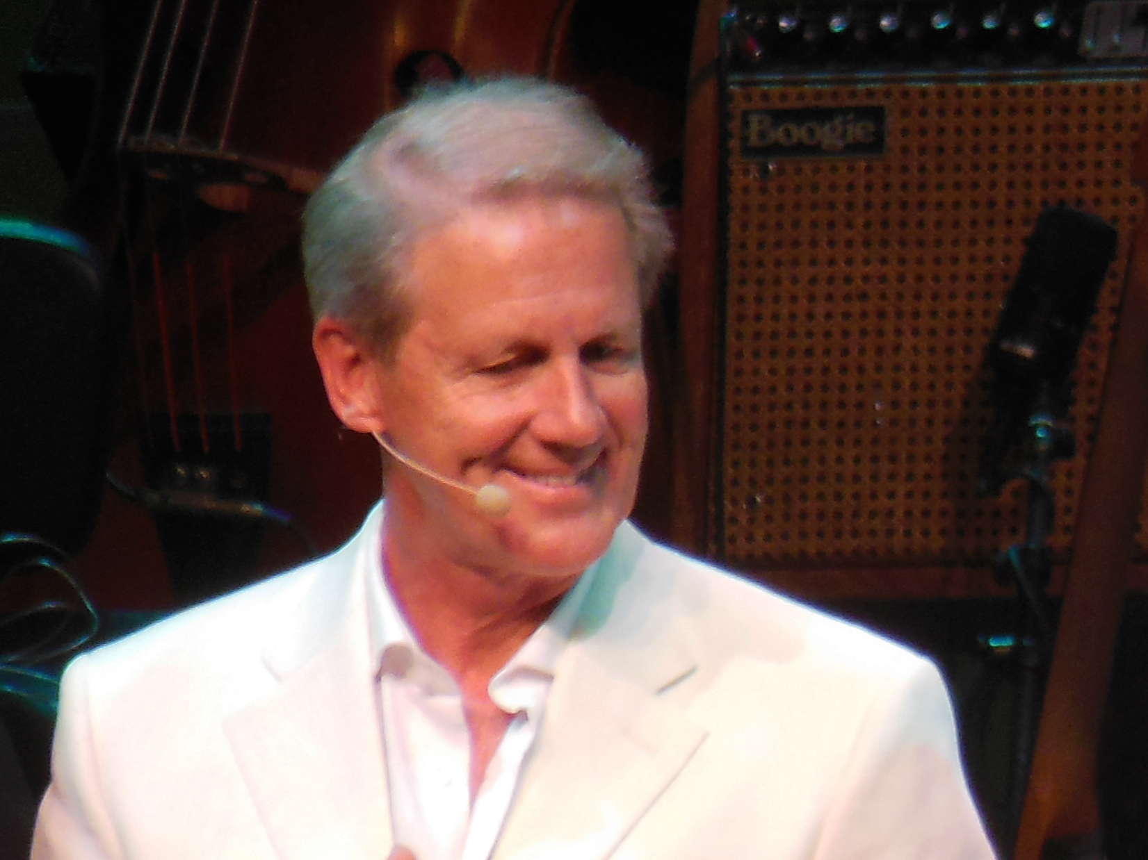 Anders Eriksson i applådtacket efter en publikrepetition av föreställningen Spargrisarna kan rädda världen, 23 september 2015.